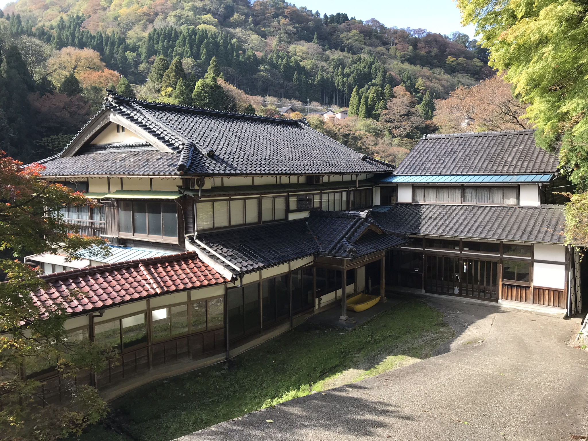 湯谷温泉の外観